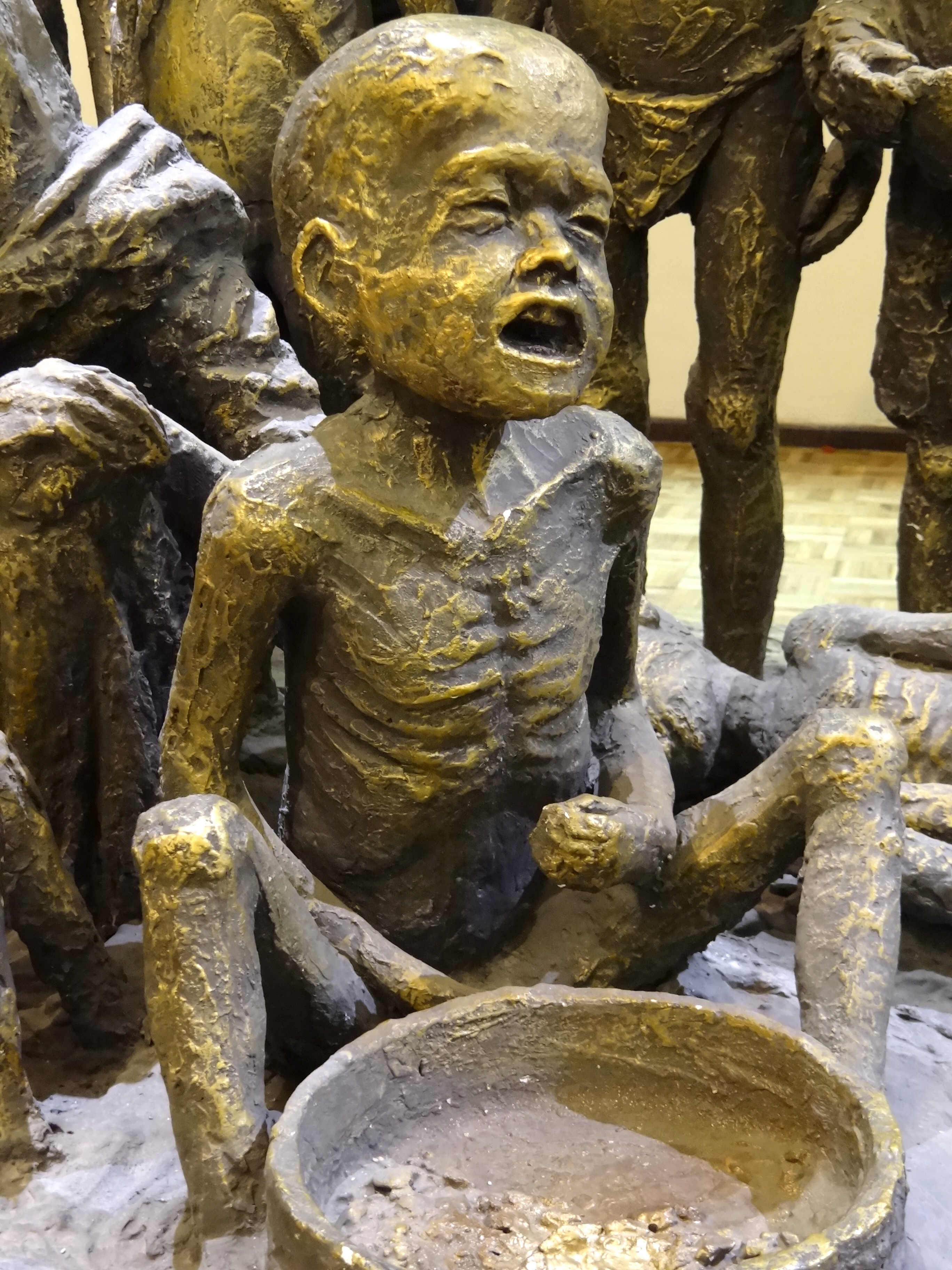 Detail of Hunger - Sculpture by Ahad Hosseini - Azerbaijan Museum - Tabriz - Iranian Azerbaijan - Iran